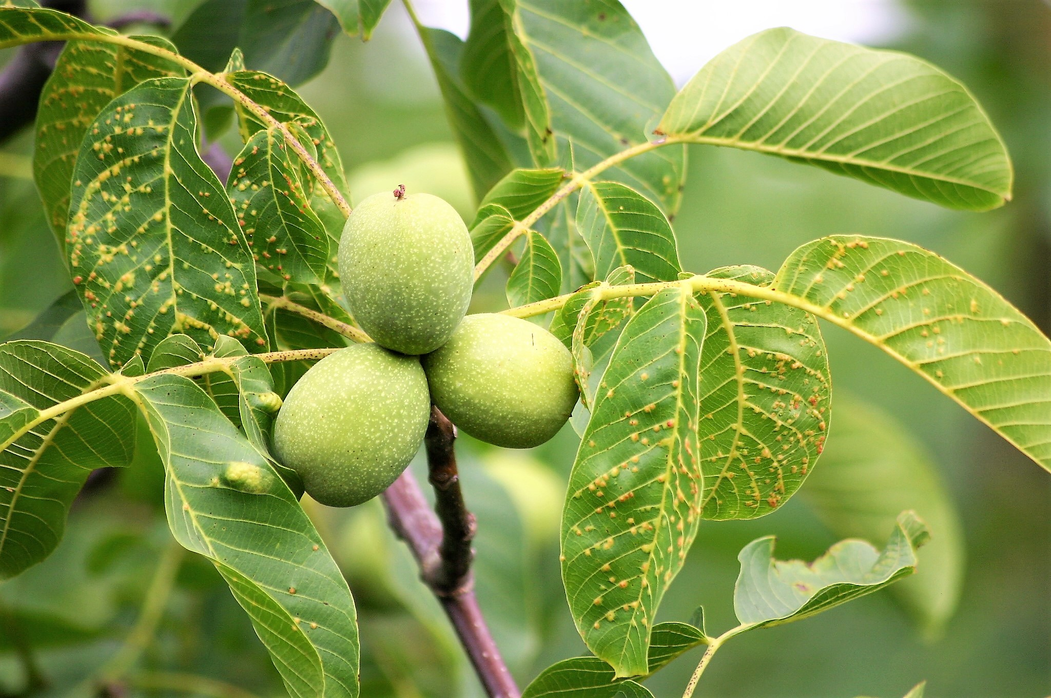 Die Früchte eines Nussbaums im Stadtgebiet von Brüssel.